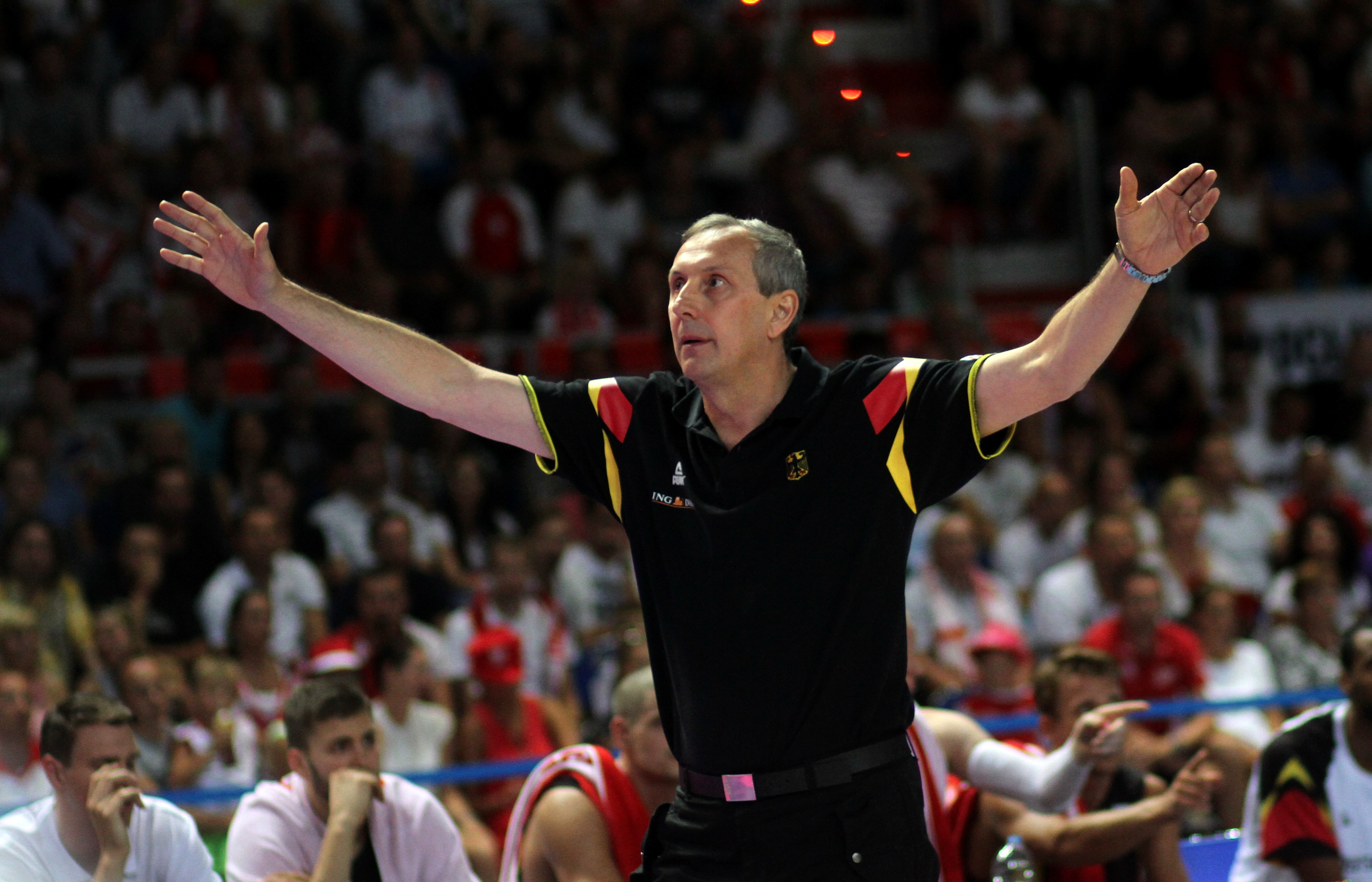 Eliminacje do EuroBasketu 2015: Polska Niemcy, Toruń, 10 sierpnia 2014. Trener reprezentacji Niemiec w koszykówce Emir Mutapcić